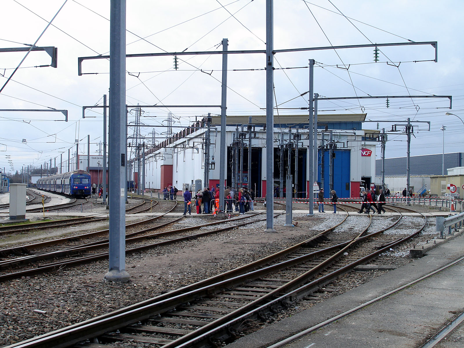 Bâtiments du technicentre Paris Nord-Joncherolles, Villetaneuse, Seine-Saint-Denis, France.